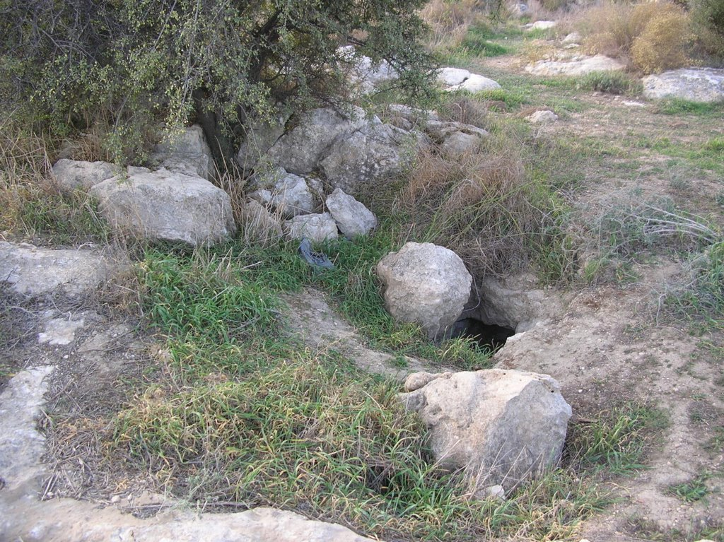 ברפיליה, בור מים